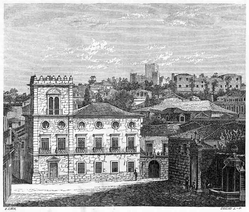 Antigo Terreiro da Misericórdia, actual Largo João Franco.